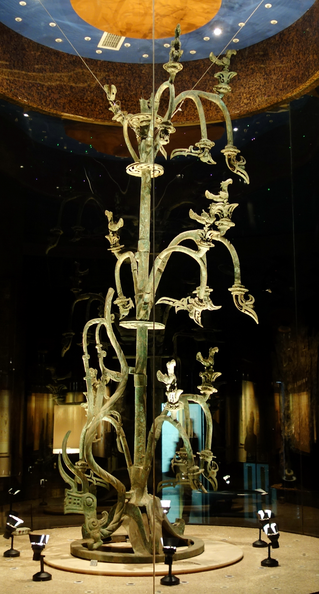 Ⅰ号大型青铜神树，三星堆遗址二号祭祀坑出土，由底座、树和龙三部分组成，通高3.96米，铜树顶部及龙身后段残缺。是国家文物局规定首批禁止出国（境）展览文物之一。